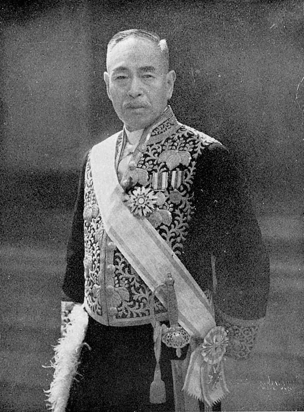 昭和13年8月 針塚長太郎（正三位勲一等の正装）